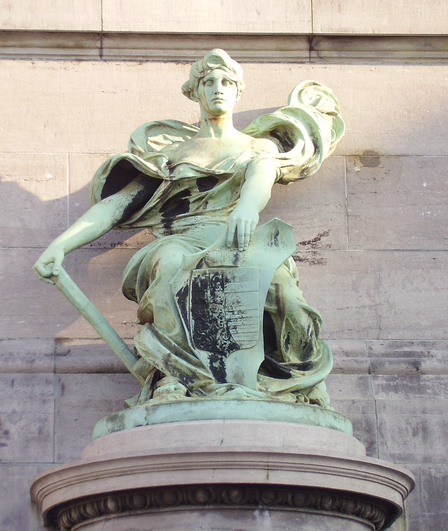 Arcades du Cinquantenaire, Bruxelles - Province de liège par Charles Van der Stappen